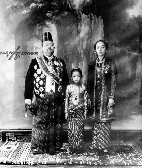 Repronegatief. Z.H. Pakoe Boewono X, Soesoehoenan van Solo (1893-1939), met echtgenote en dochtertje in Soerakarta..